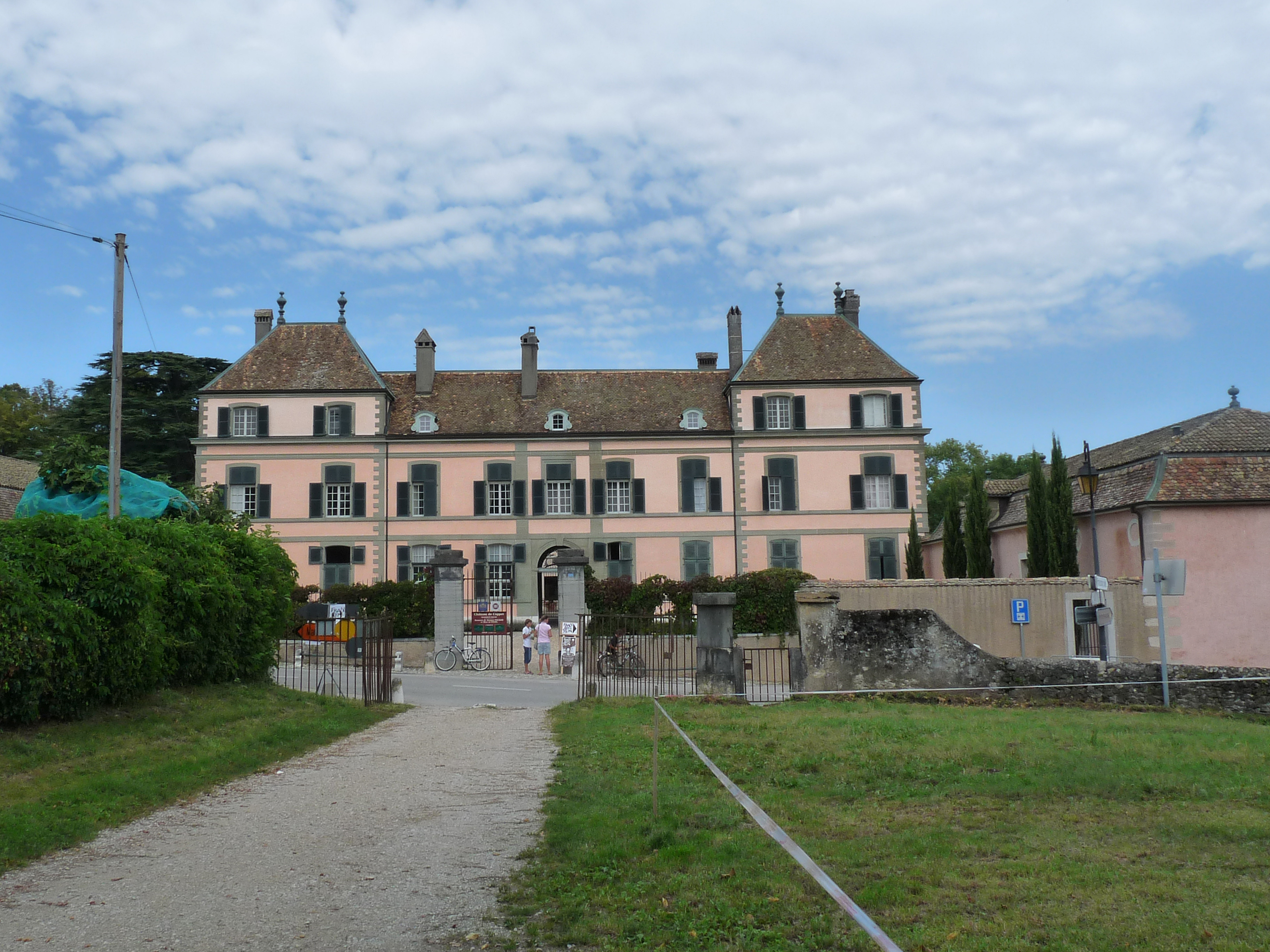 Château de Coppet (près de Genève, canton de Vaud, Suisse)